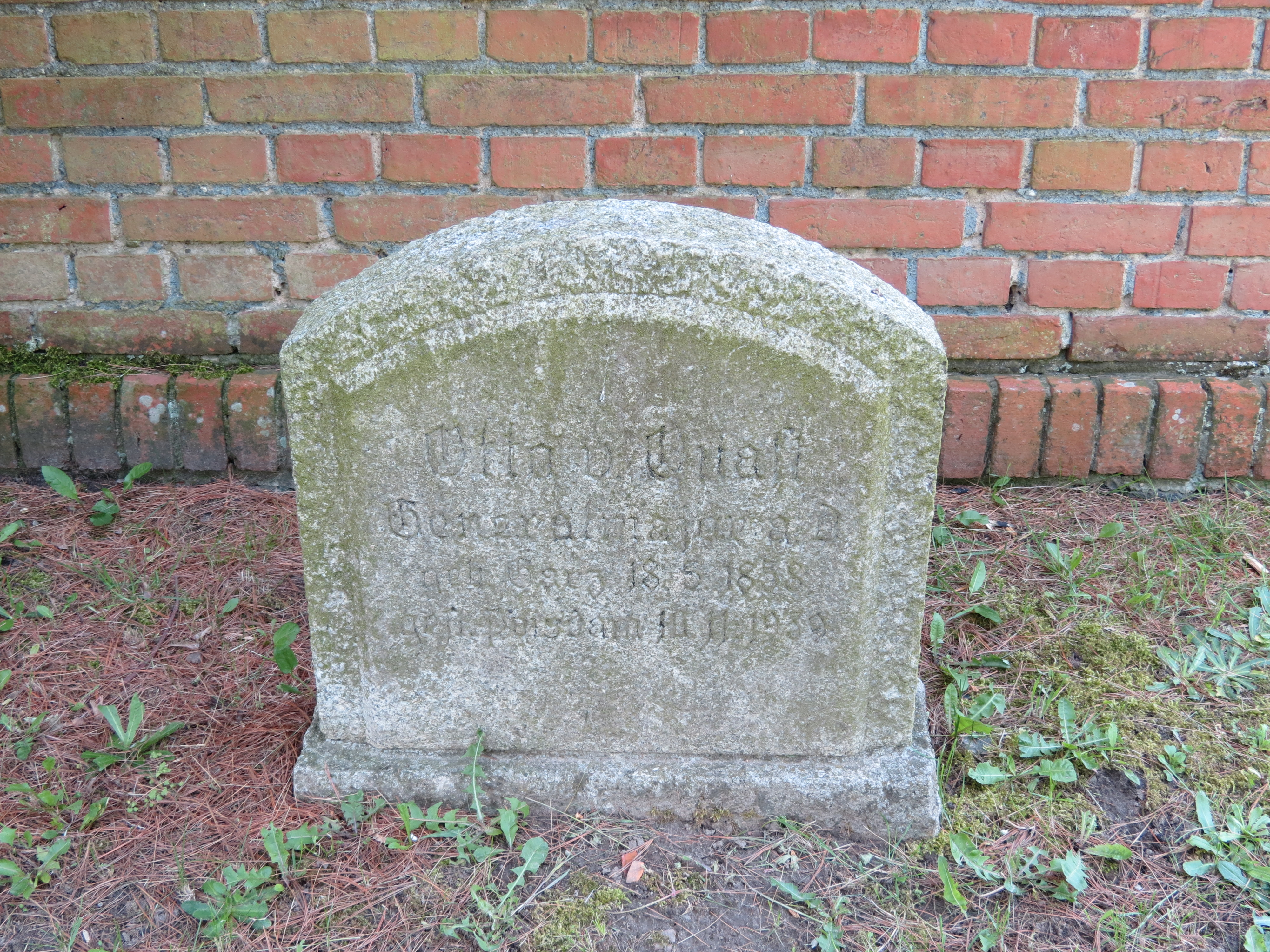 Dorfkirche Gartow, in Gartow, OT der Gemeinde Wusterhausen, Landkreis Ostprignitz-Ruppin, Brandenburg, Epitaph Maria von Quast